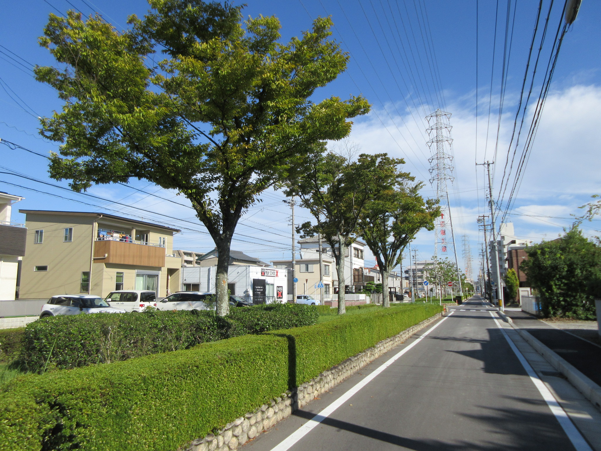 六名東緑道。正式名は第5号六名東緑地。 左側は六名本町、右側は六名新町。